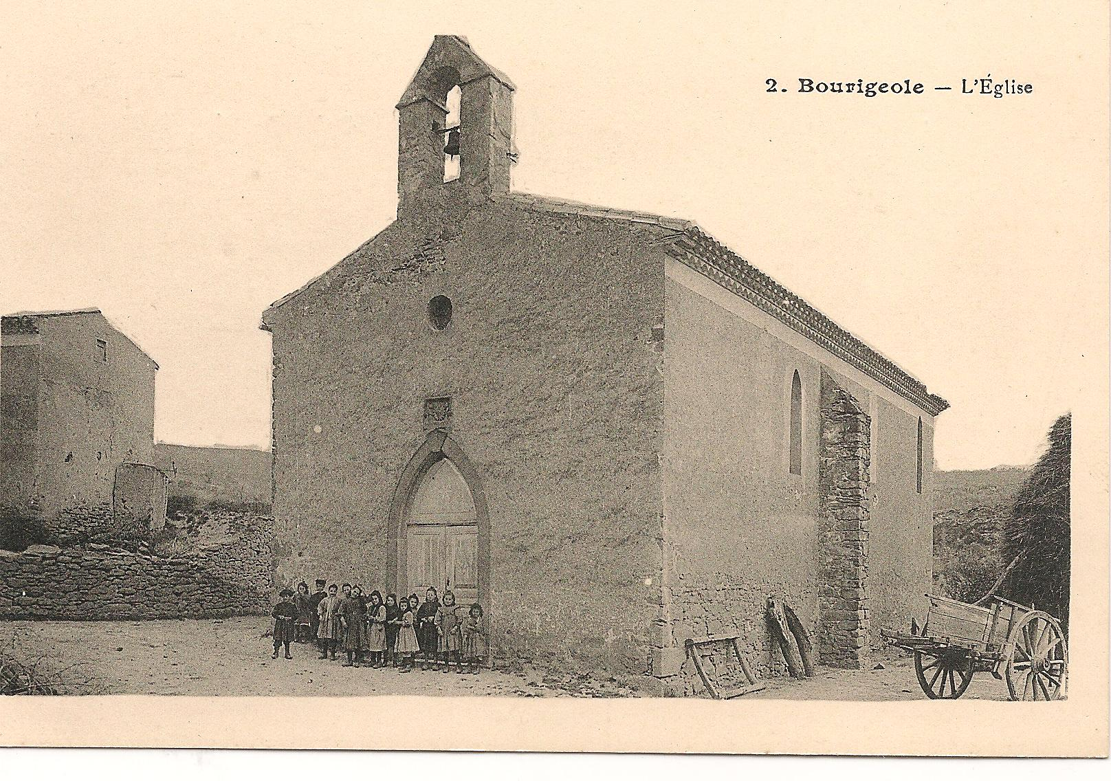 Église Sainte-Eulalie de Bourigeole